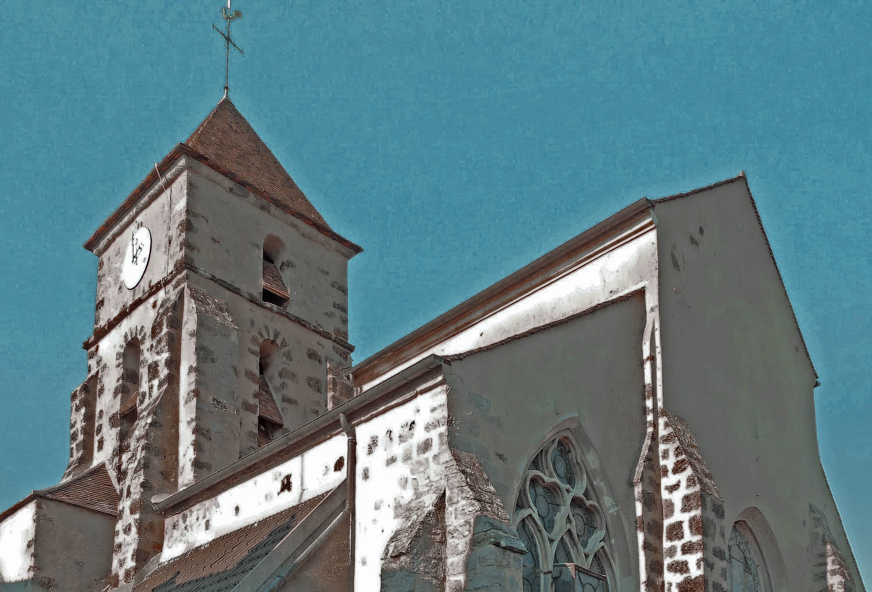 L'église Saint-Pierre de Brétigny-sur-Orge (91)